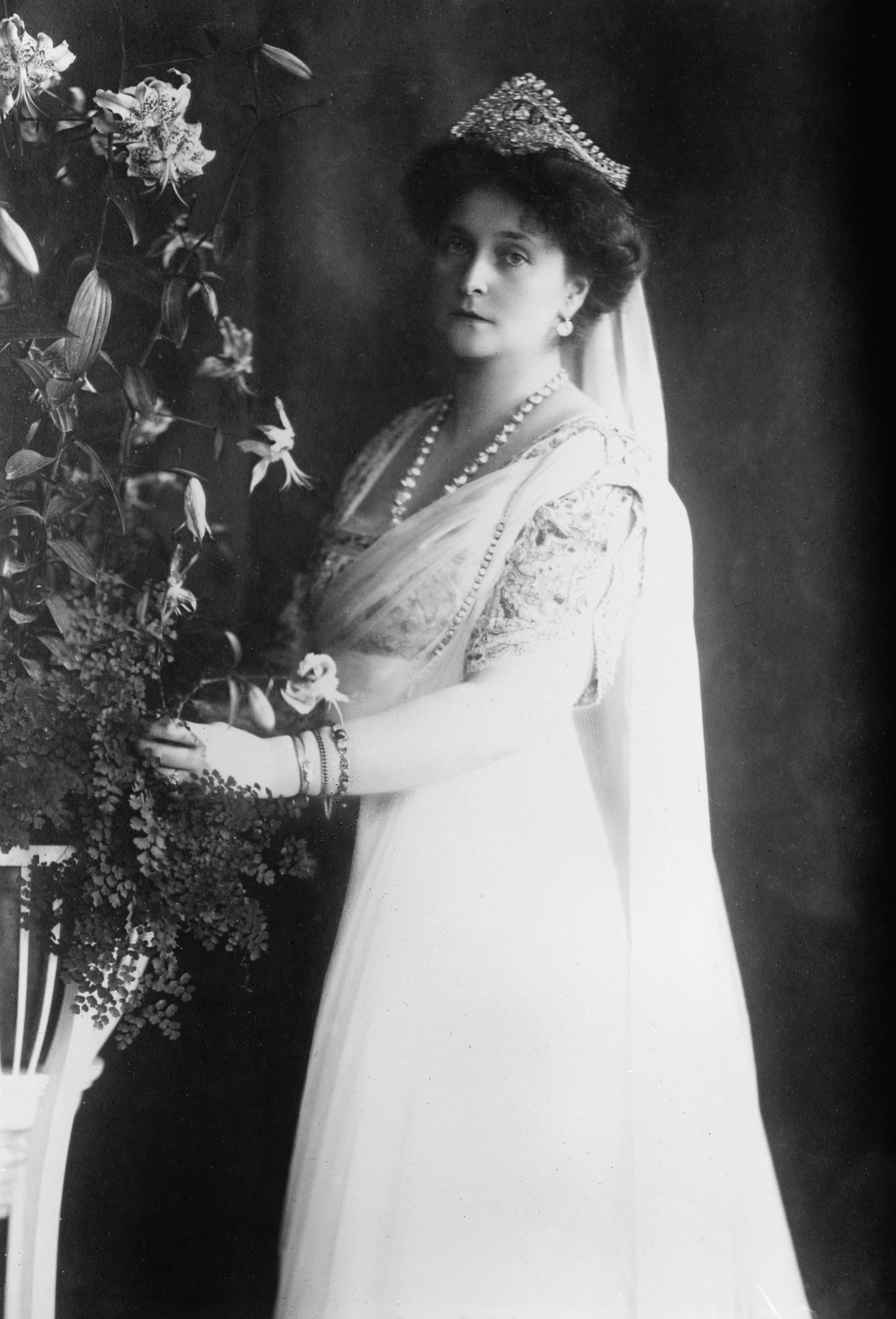 Czarina Alexandra Fyodorovna.